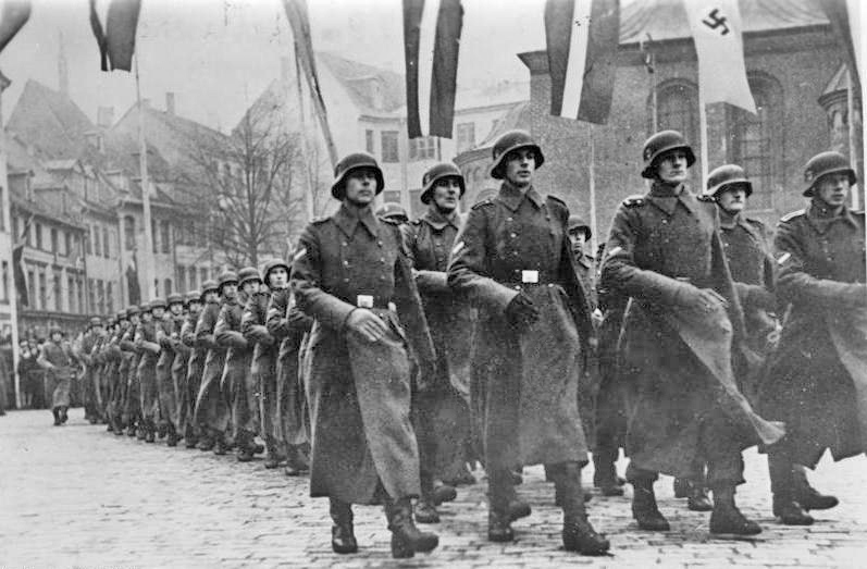 Lettland beging seinen Nationalfeiertag. Anlässlich der 25. Wiederkehr des lettischen Nationalfeiertages [18.11.43] fand ein Standortappell der Einheiten der lettischen Freiwilligen-SS-Legion statt. UBz. die Formationen der Legion auf dem Wege zum Appellplatz. Bei Abdruck nennen: Scherl Bilderdienst, 2.12.43 [Herausgabedatum] 532-43 English translation: The Latvian SS Volunteer Legion on parade celebrating the 25th anniversary of National Latvia Day. Scherl photo service, 2 Dec 43 [Release Date]